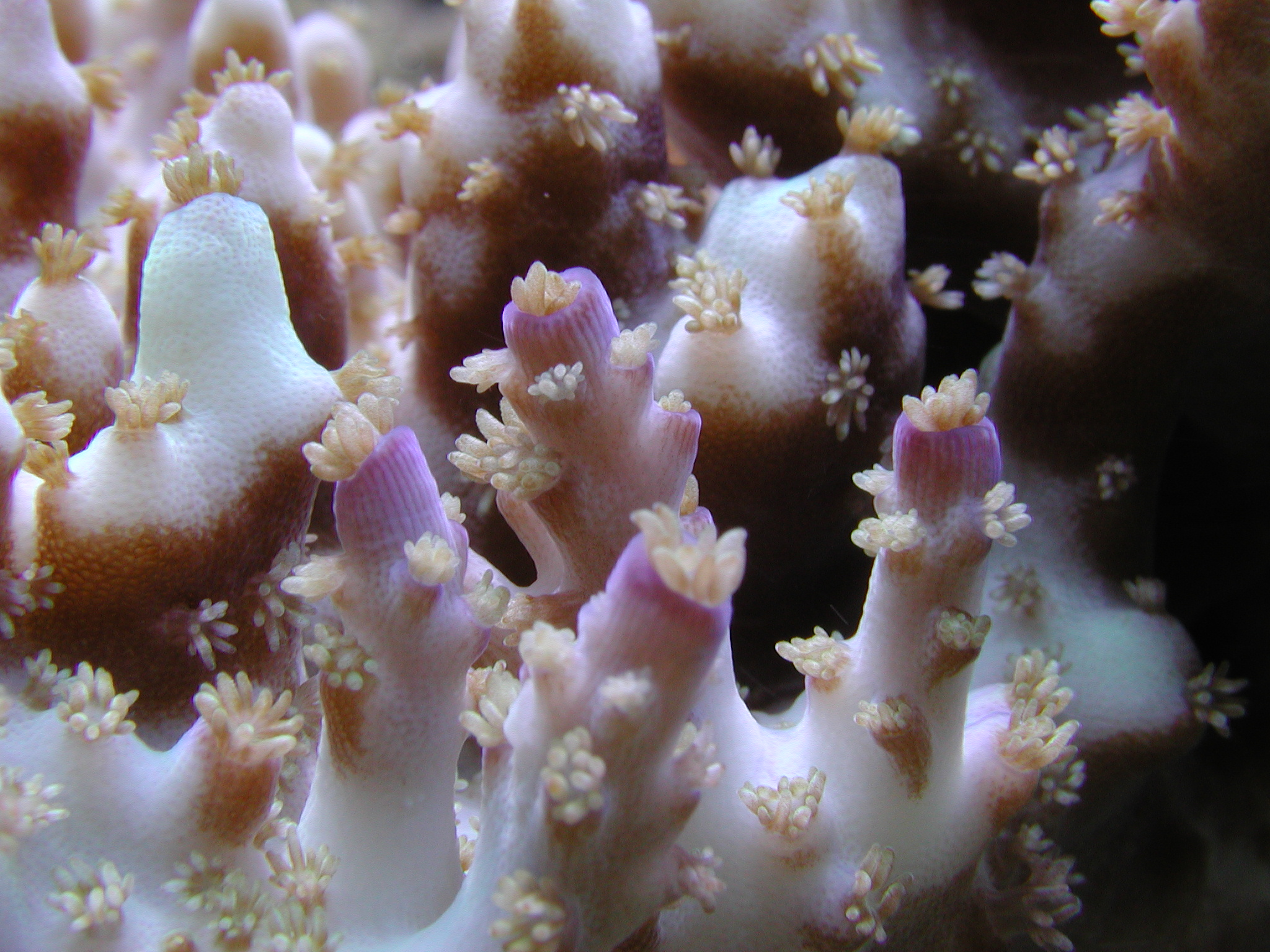 Acropora (David Excoffier)